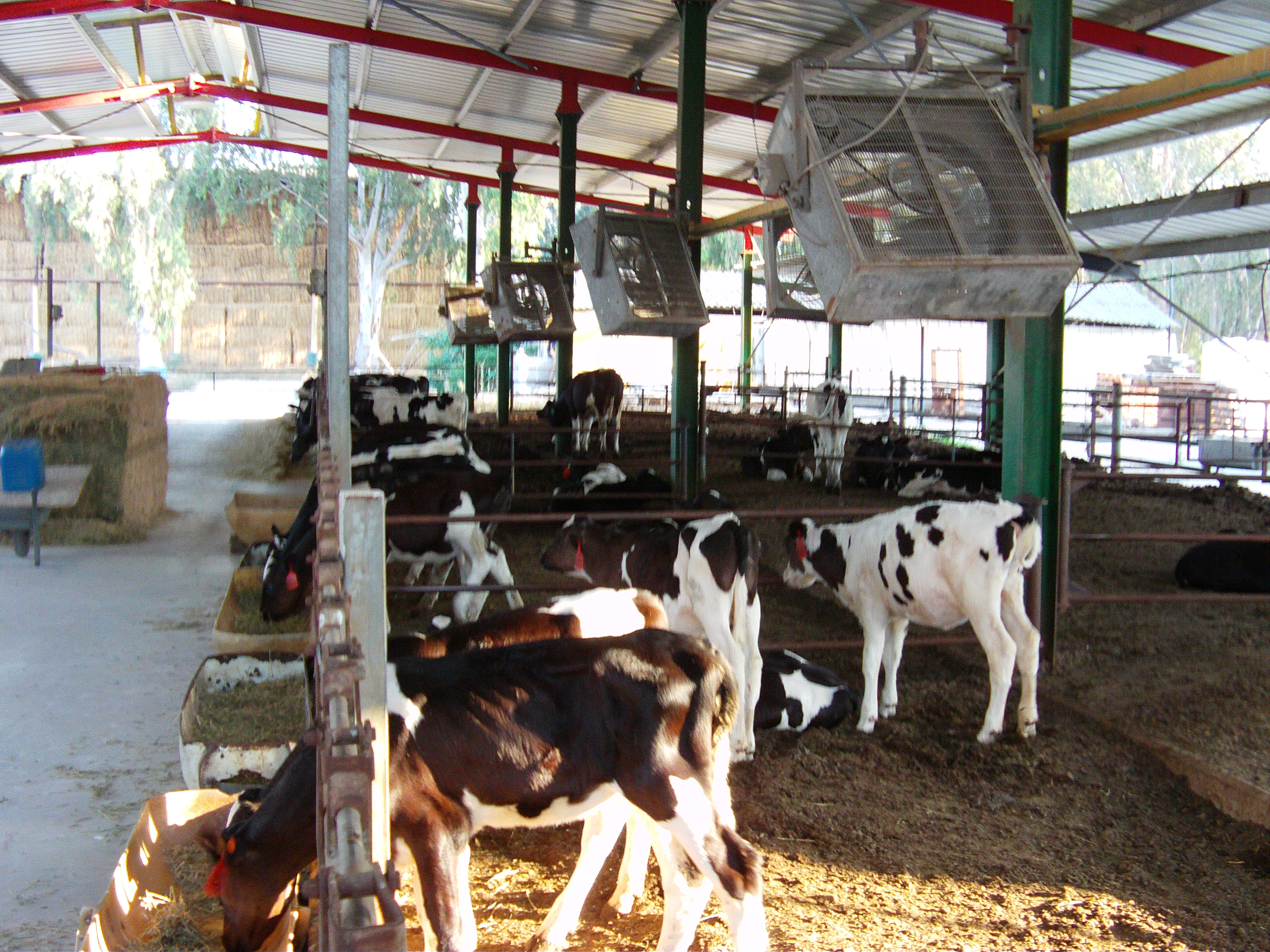 Kibutz Beerot Ytzhak רפת יונקים מבט מבפנים